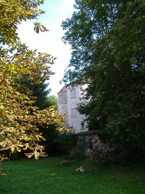 Schloss Bächingen